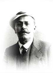 Ion Luca Caragiale